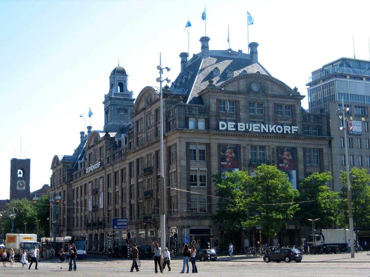 Flagship store of Dutch retailer De Bijenkorf in Amsterdam.